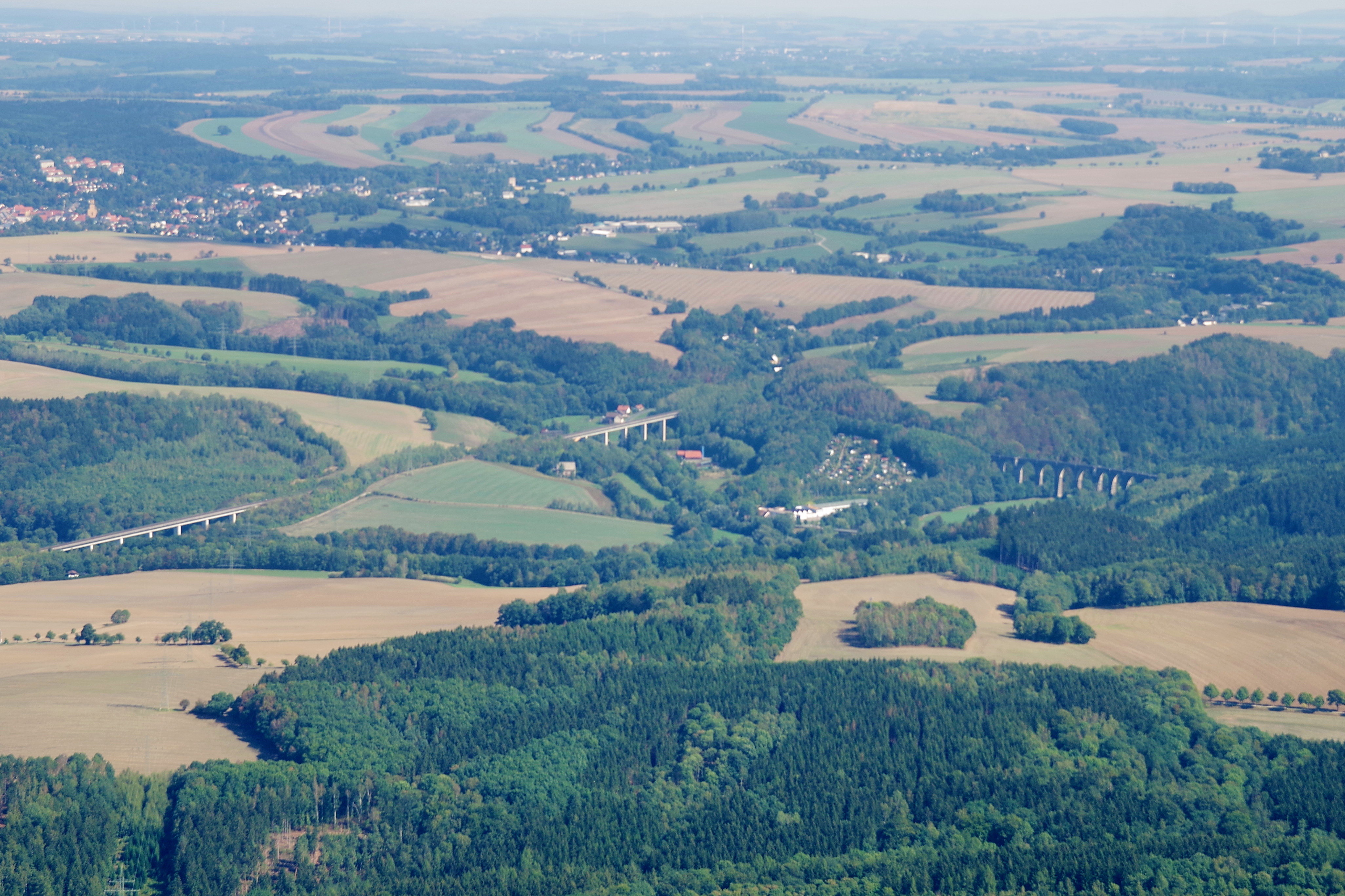 Hetzdorf (Flöhatal) mit neuer (links) und alter (rechts) Bahntrasse. Links oben im Bild: Oederan